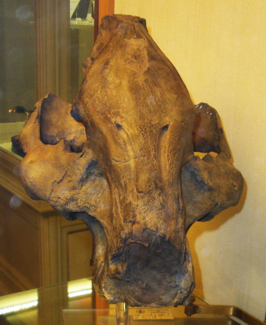 Fossil of Propotamochoerus, an extinct mammal- Took the picture at Museo di Paleontologia di Firenze